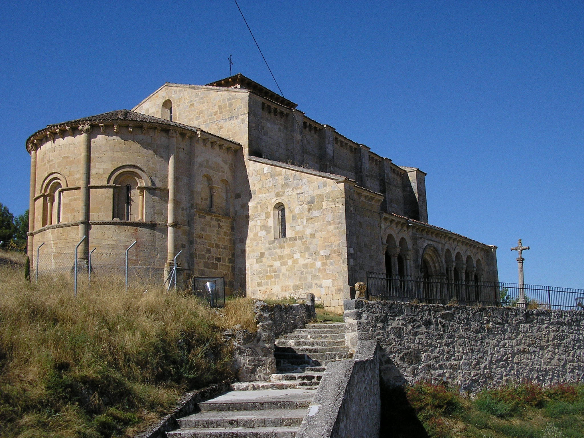 Fuentidueña - Iglesia de San Miguel (Vista Exterior)